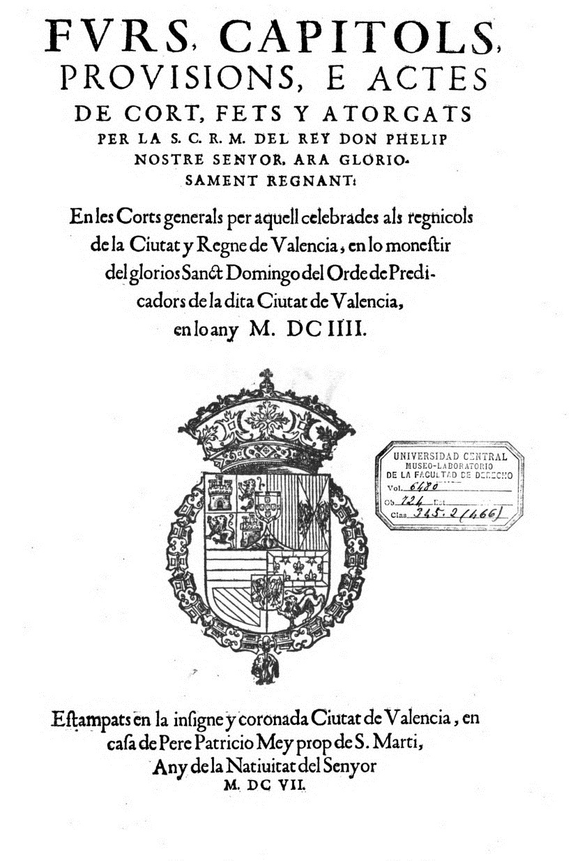 Portada de l'obra "Furs, capitols, prouisions e actes de cort, fets e atorgats per la S. C. R. M. del rey don Phelip... en les Corts generals per aquell celebrades als regnicols de la ciutat y regne de Valencia, en lo monestir del glorioso Sancto Domingo..., en lo any MDCIIII". Valencia : en casa de Pedro Patricio Mey, 1607.